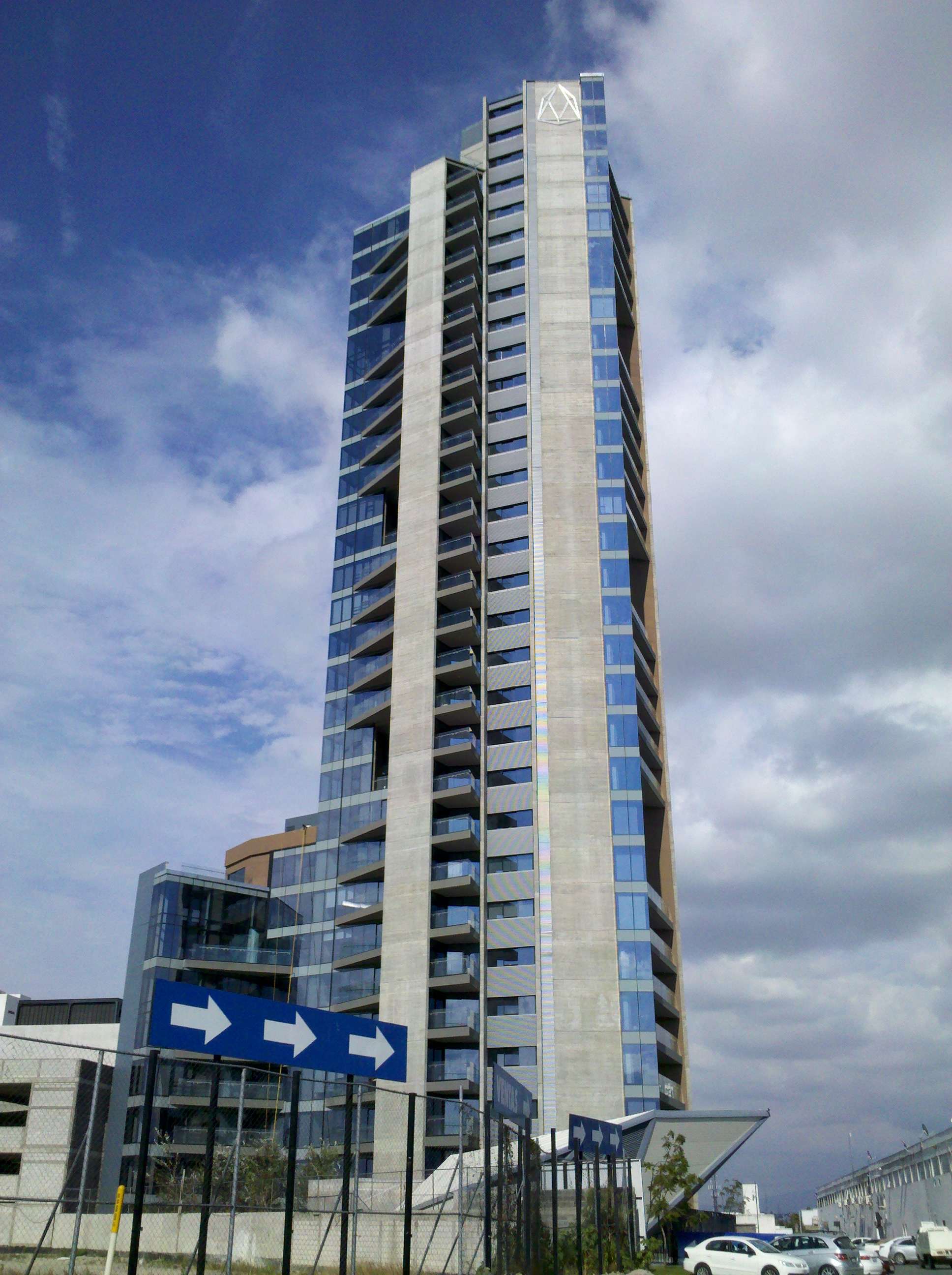 Torre Adamant II. Boulevard Atlixcáyotl 4010. Puebla, México.